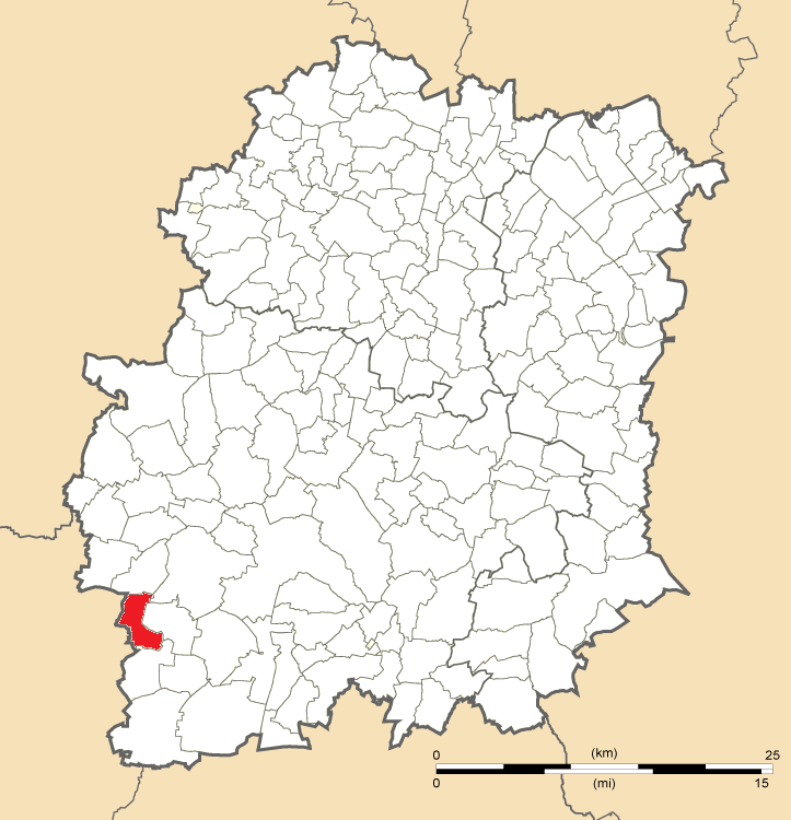 Carte de position de Congerville-Thionville en Essonne (91)